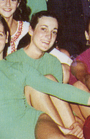 Leticia Herrería con la selección nacional de gimnasia rítmica en 1975.